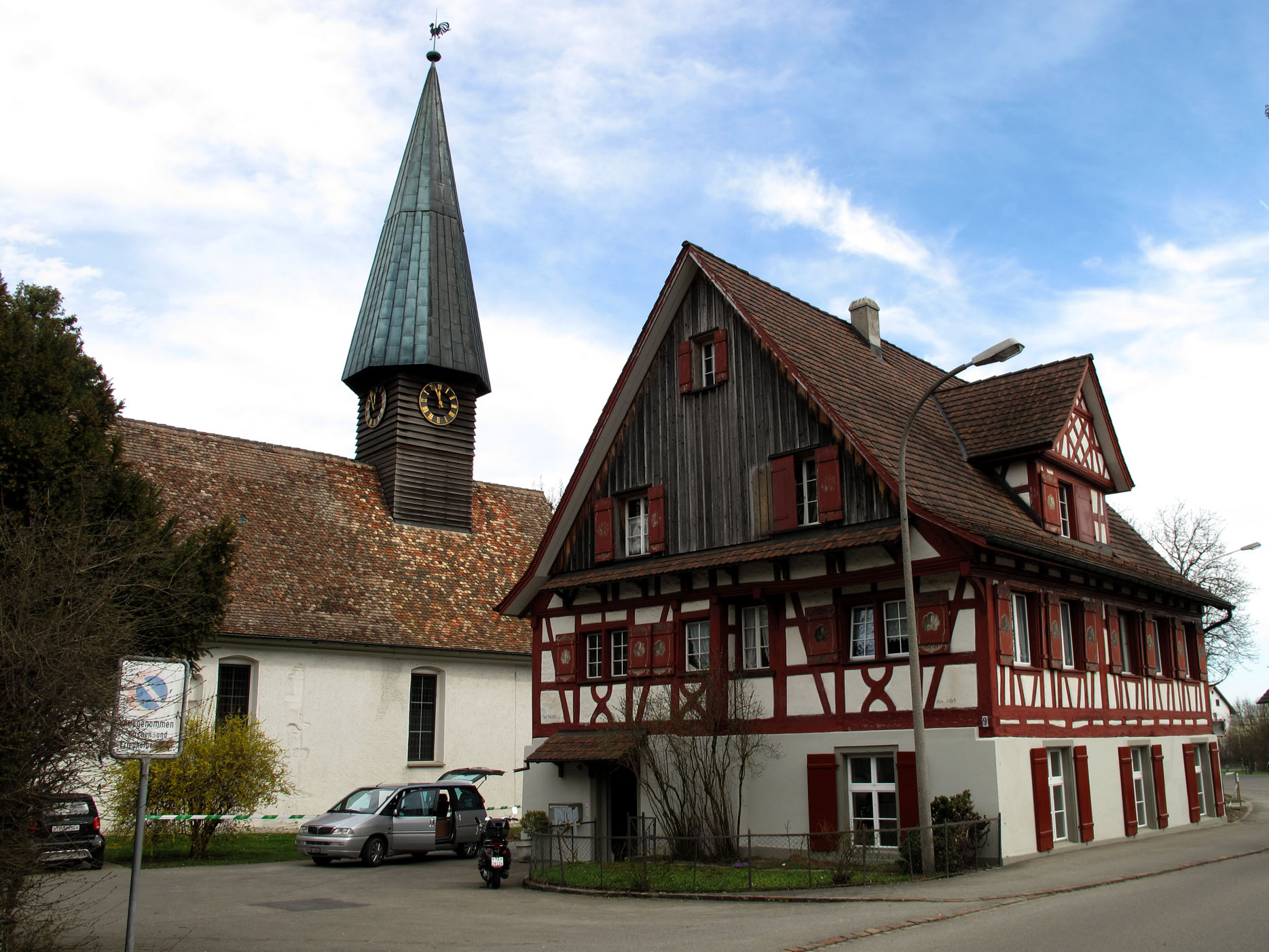 Imagen de una calle de Kreuzlingen con la típica casa de entramado de madera y la iglesia evangélica al fondo